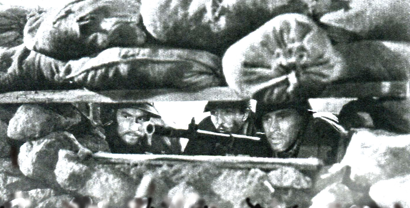 Quelli della montagna (Vergano + Blasetti, 1943) - Foto di scena bellica